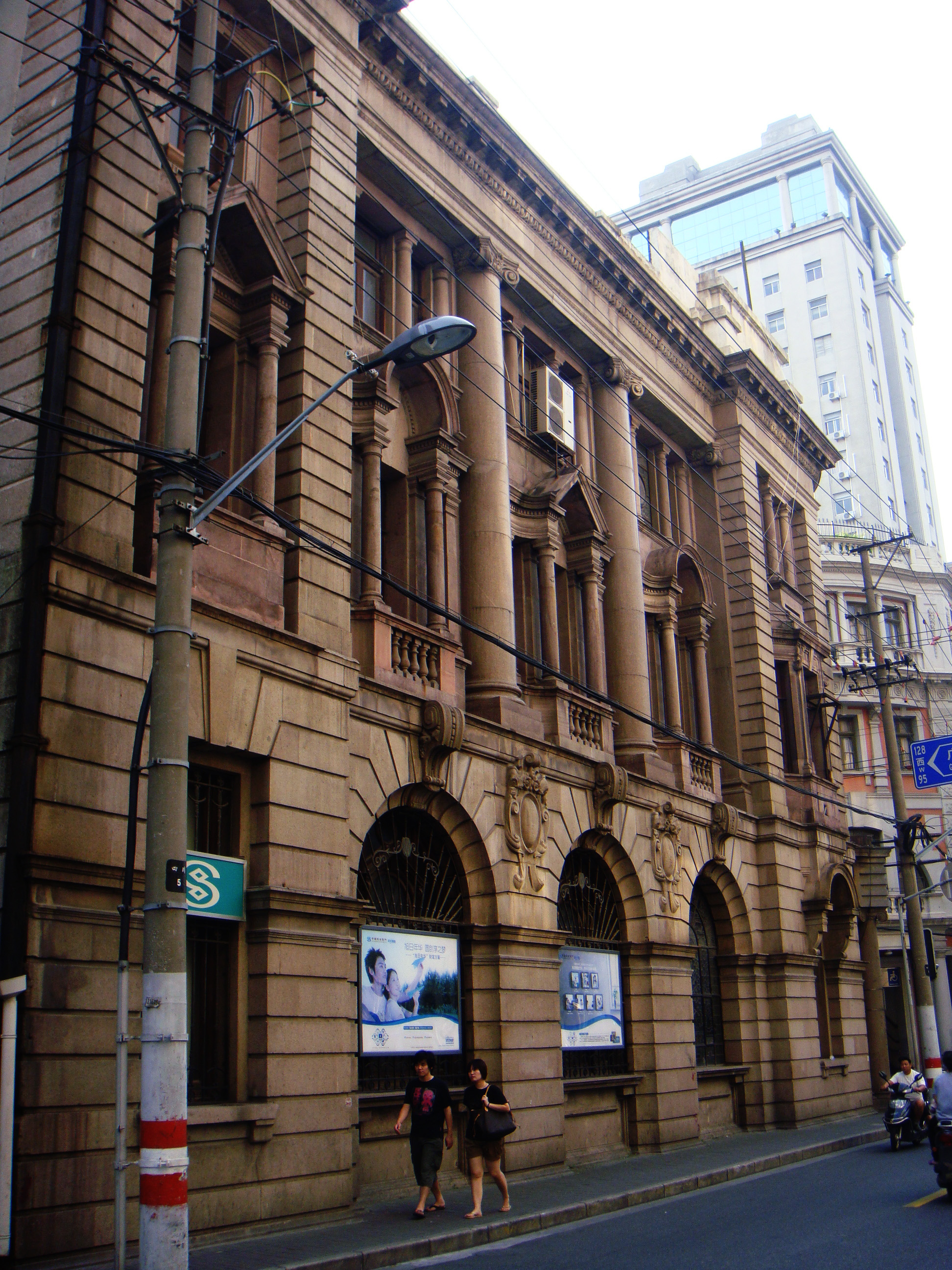 四川路一侧的永年大楼立面